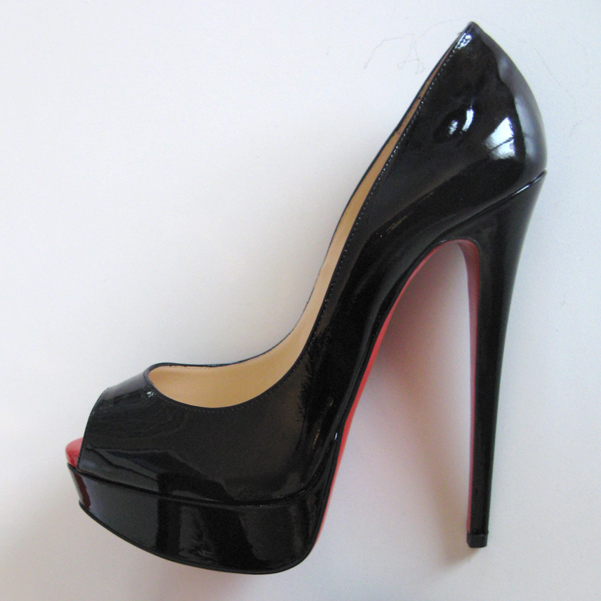 Escarpin ouvert "peep toe" à plateforme, en cuir noir verni, modèle "Lady Peep", marque Christian Louboutin, talon 150mm